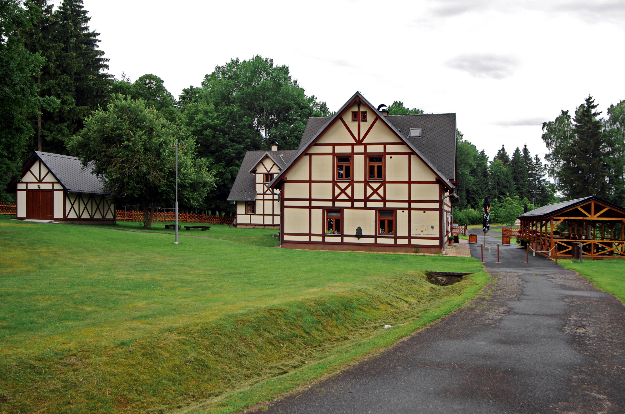 Hory u Karlových Varů, penzion Farma, okres Karlovy Vary